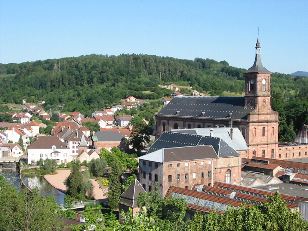 Moyenmoutier Vue sur le Centre : abbaye et usine accolées Commune du canton de Senones (Vosges) Photo personnelle du 17 juillet 2006. Copyright © Christian Amet .